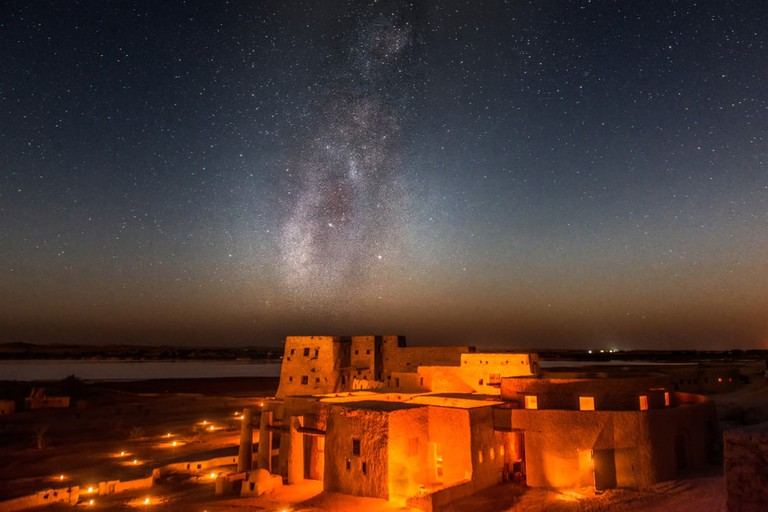 مجرة درب التبانة من واحة سيوة